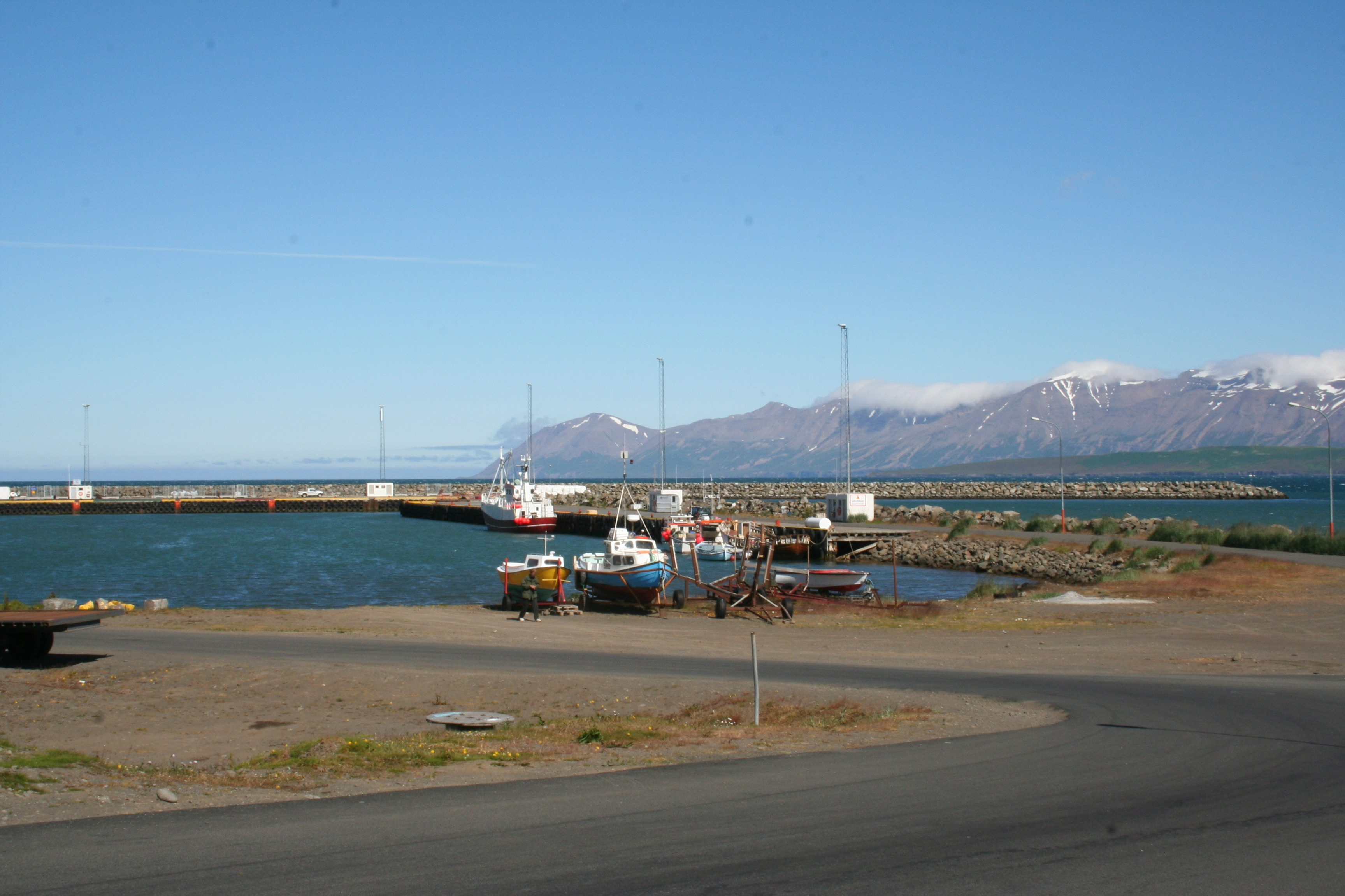 Dalvik0170